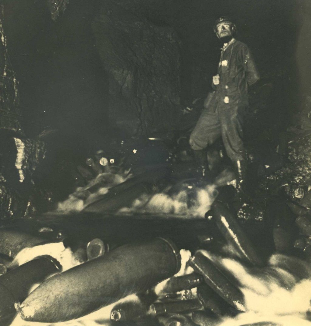 Le scientifique Charles Domergue au puits Jardelle en 1935